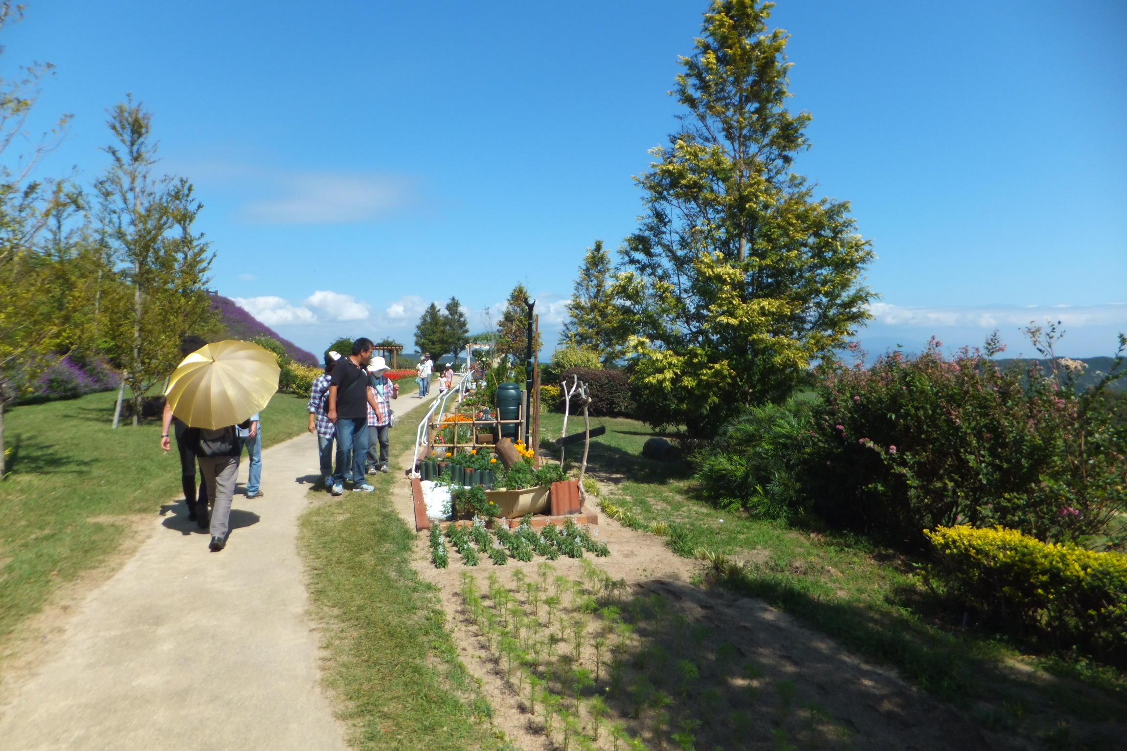 淡路花さじき 2013年9月29日